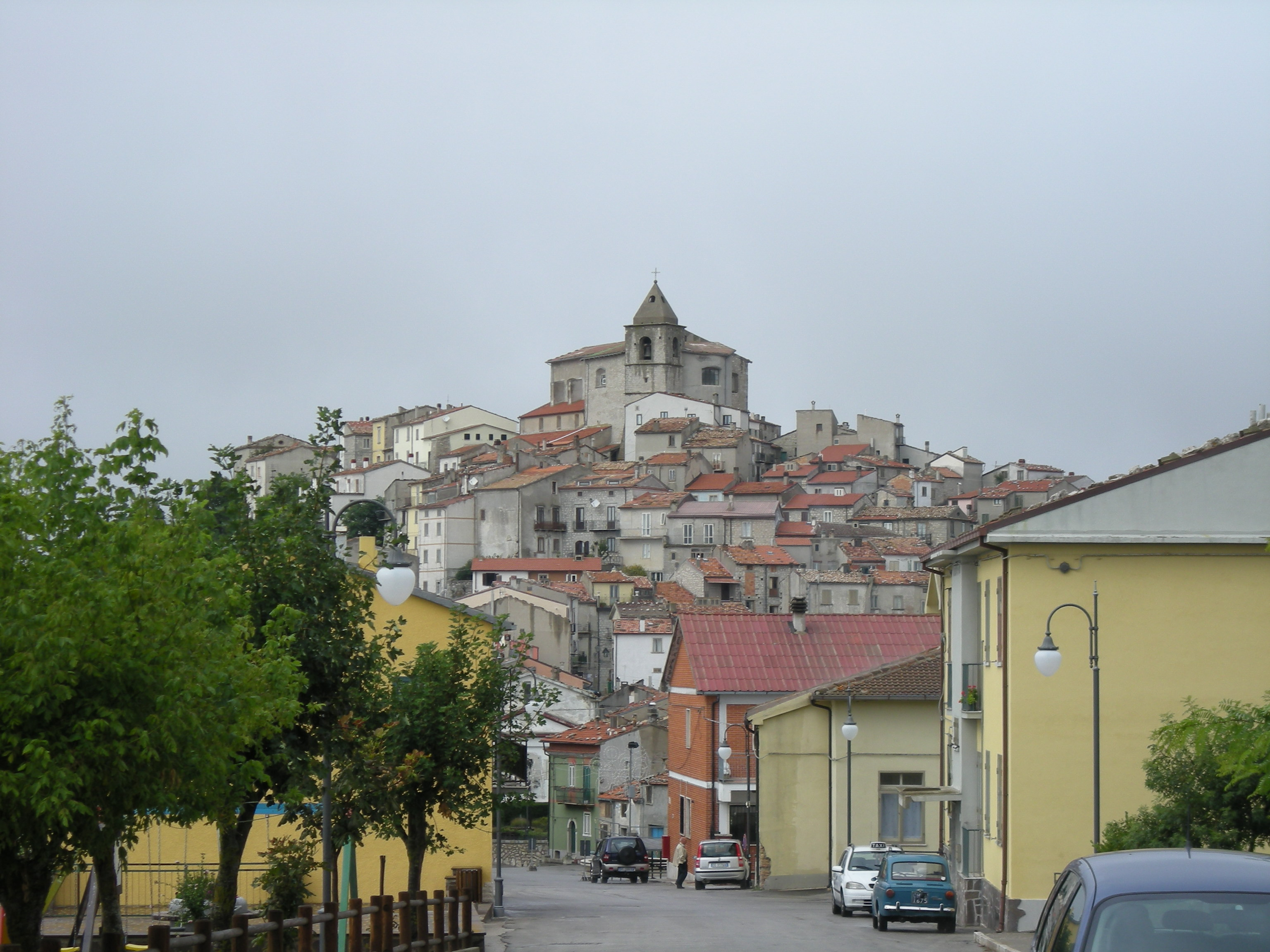 Schiavi_di_abruzzo_view_from_rotonda